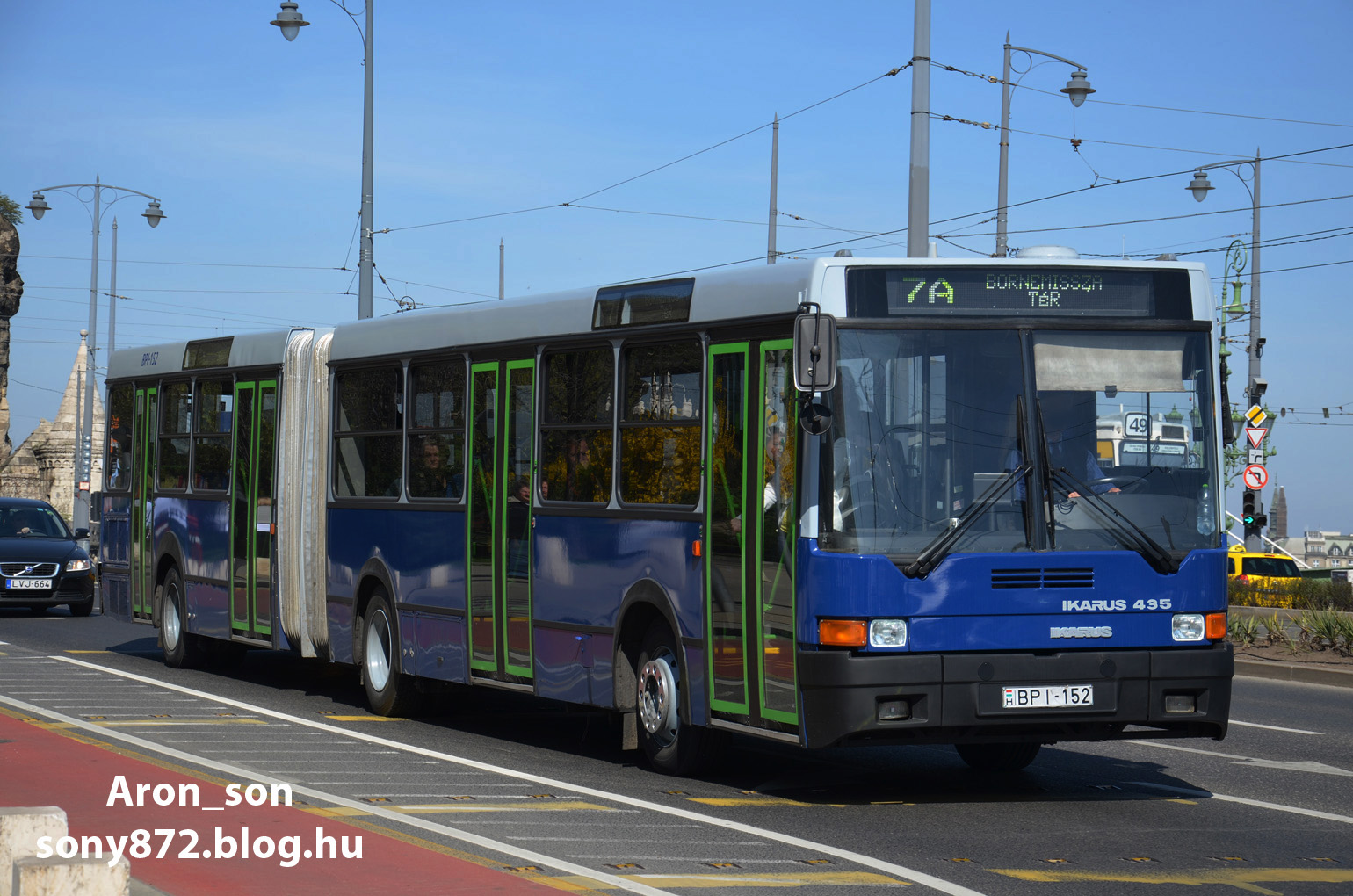 7A jelzésű Ikarus 435-ös busz a Szent Gellért téren (frsz. BPI-152)